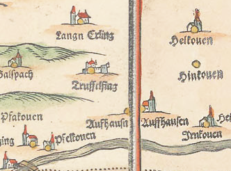 Baierische Landtafel - Ausschnitt Triftlfing